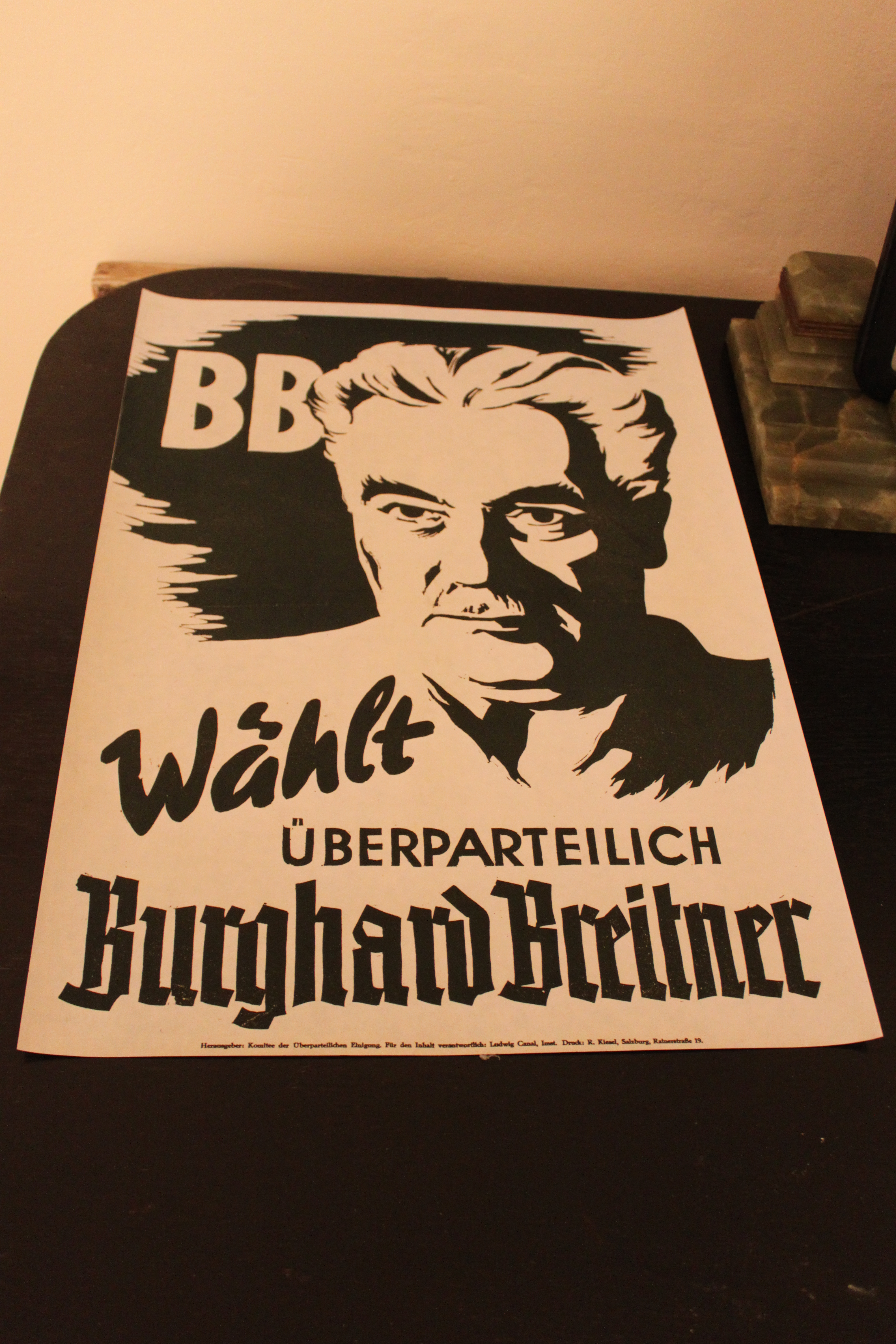 Wahlplakat zu Burghard Breitner 1951 Verband der Unabhängigen im Stiftsmuseum Mattsee